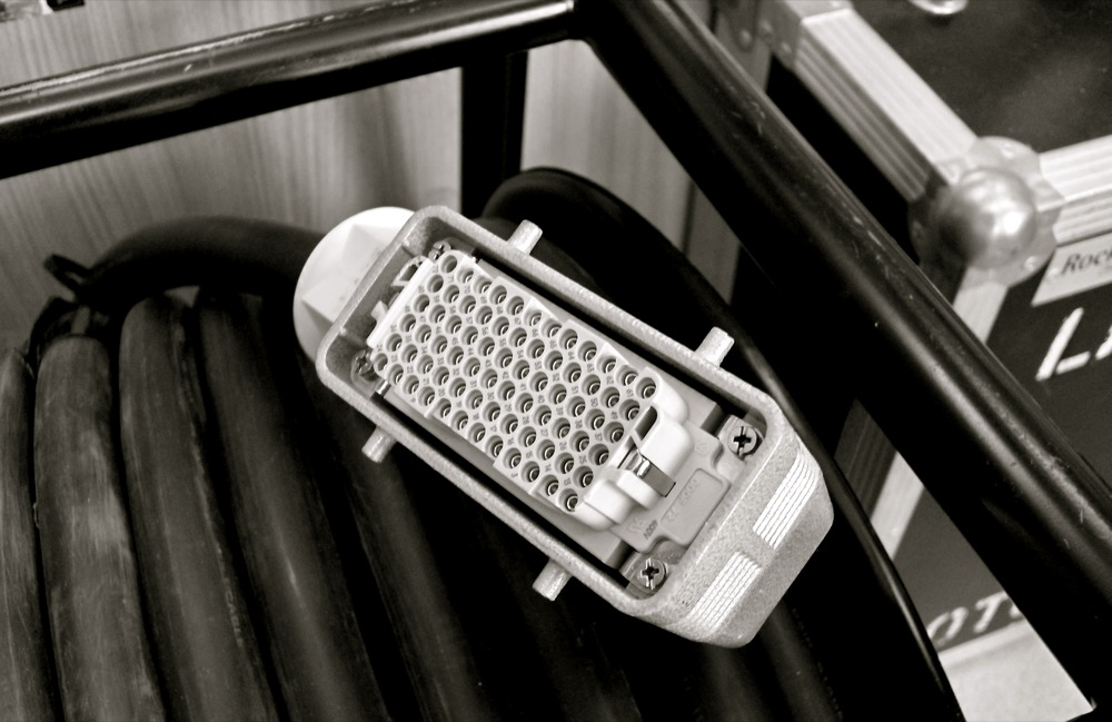 Snake cable (audio multicore cable)